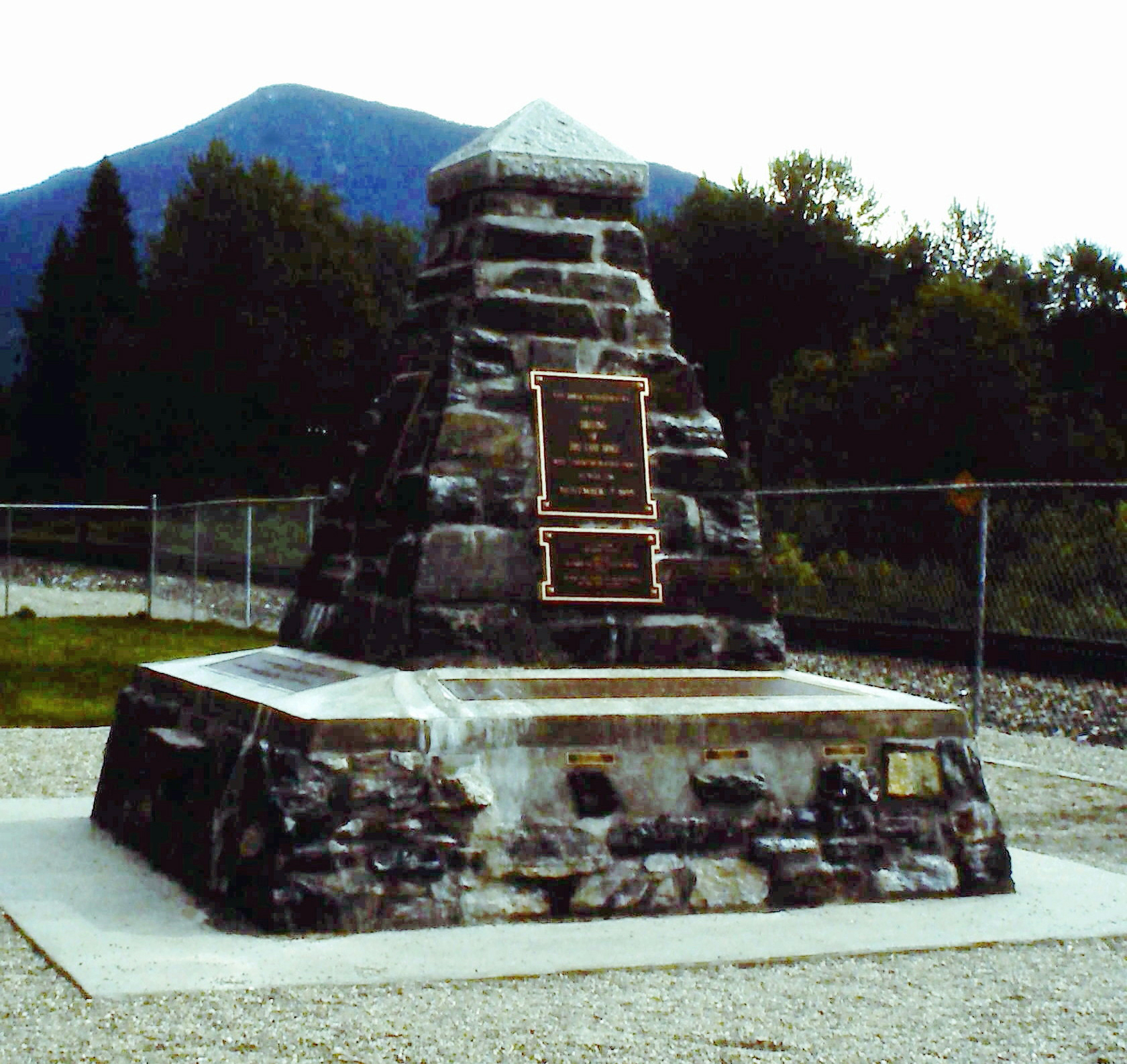 Gedenkstein „Letzter Nagel“ (last spike) der transkanadischen Eisenbahn in Craigellachie